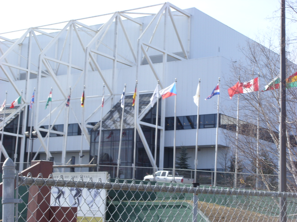 Herb Brooks Arena outside